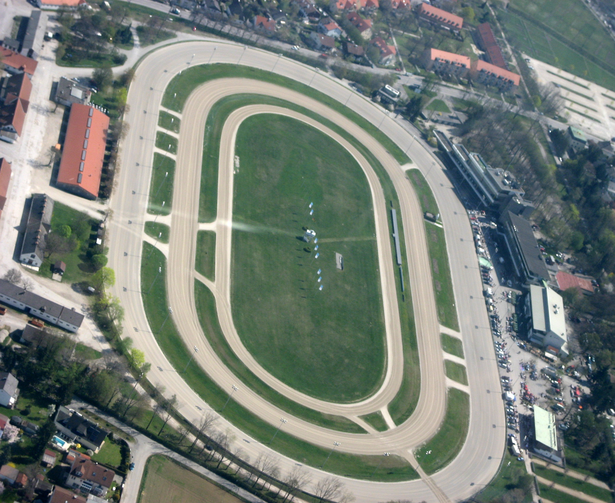 Luftbild der Trabrennbahn Daglfing